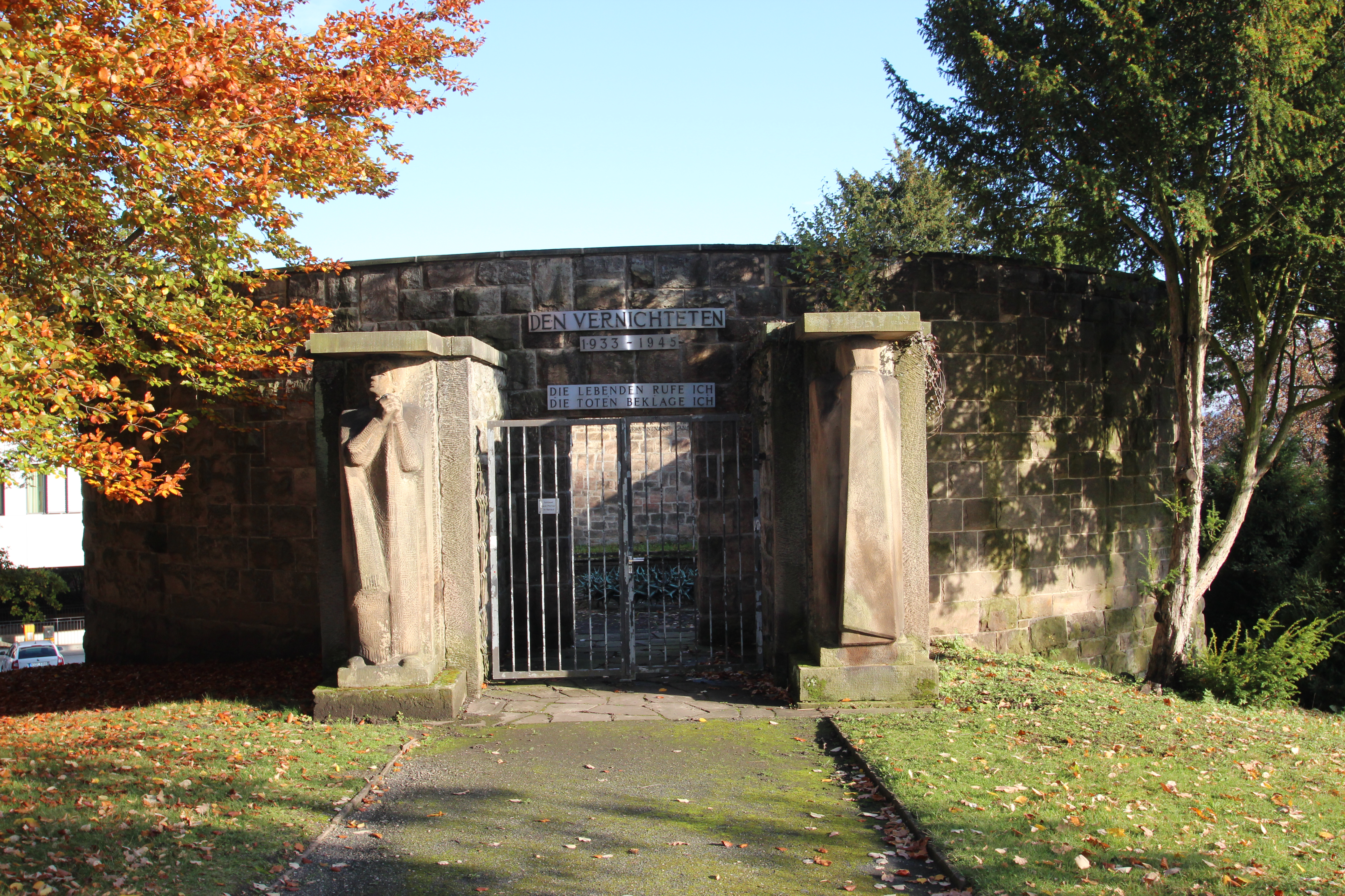 Mahnmal im Fürstengarten in Kassel